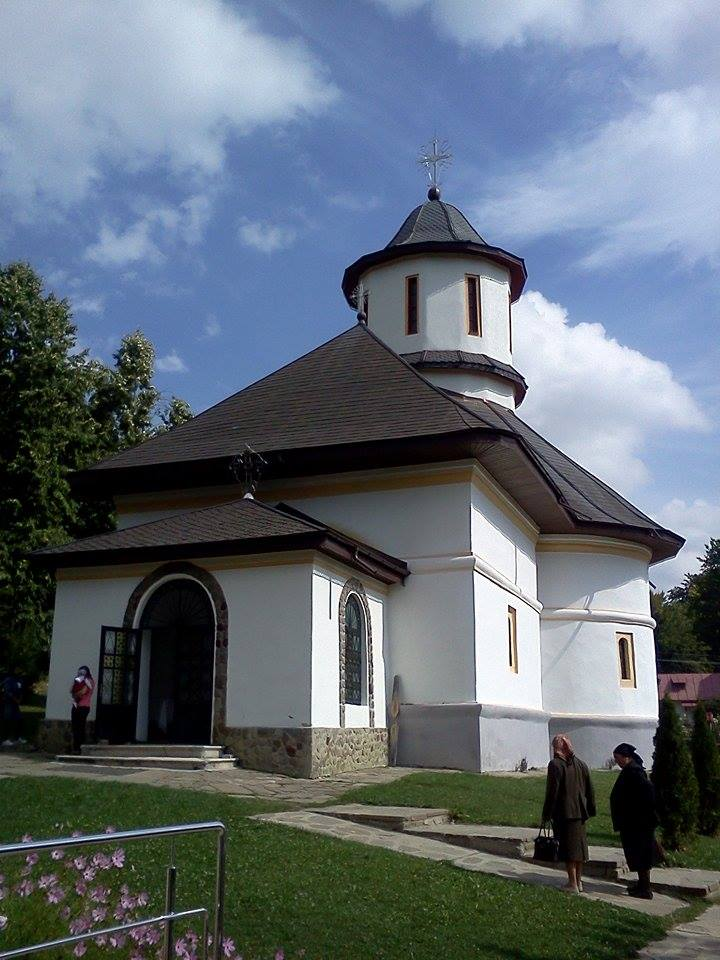 Biserica „Sf. Împărați Constantin și Elena” 01